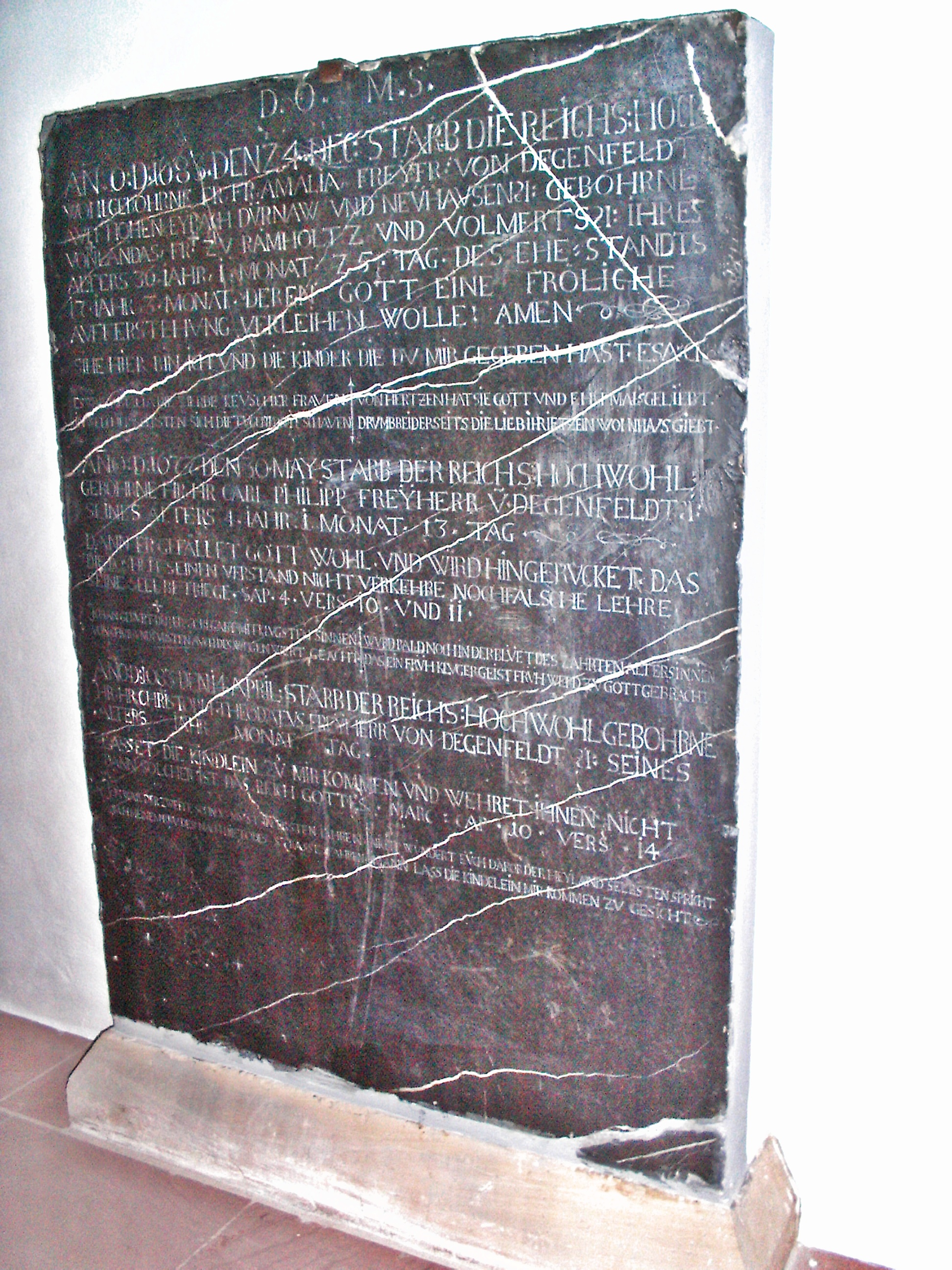 Grabplatte der Amalia von Degenfeld geb. von Landas (1647-1683), Stiftskirche Neustadt an der Weinstraße